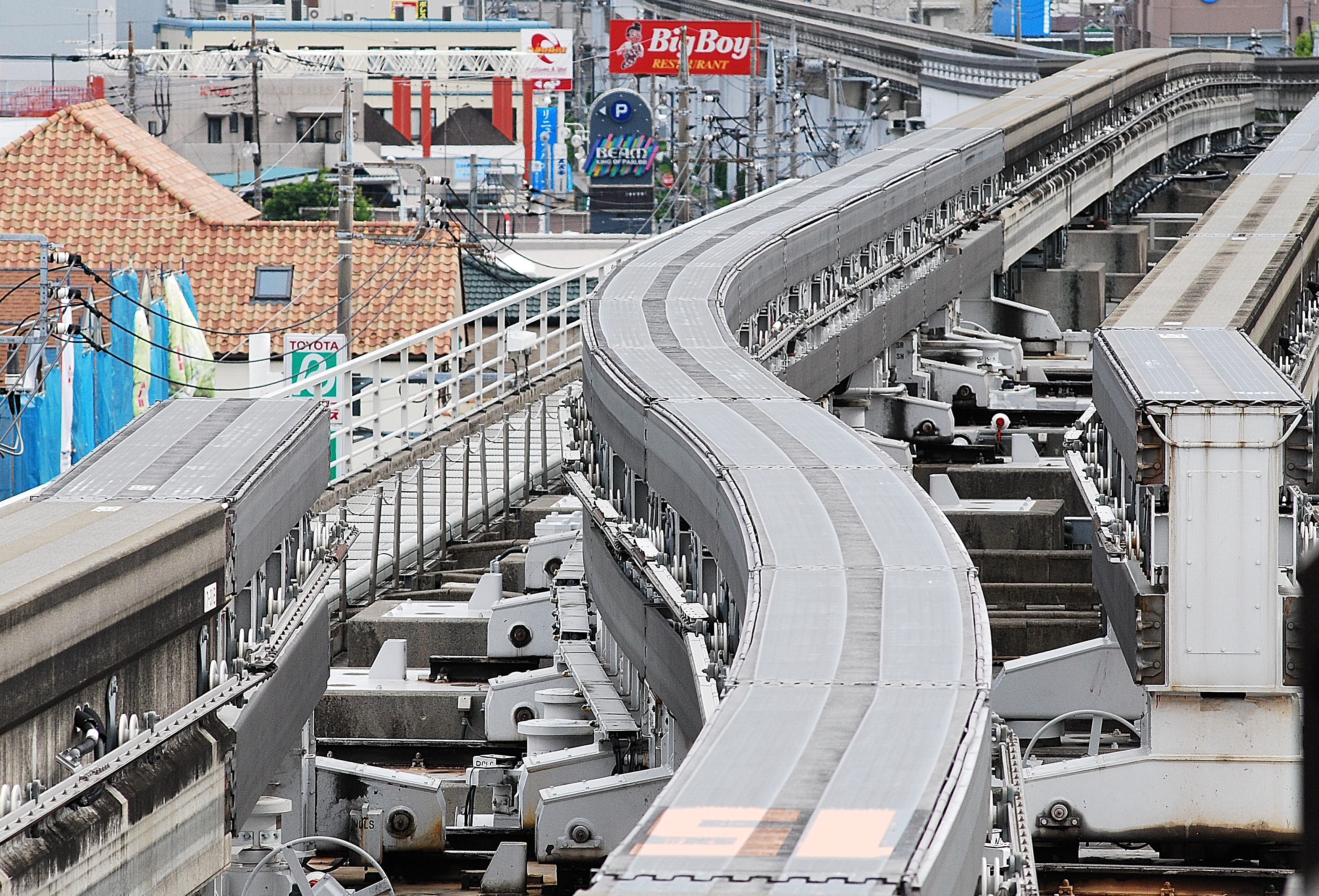 多摩都市モノレールの分岐装置、上り線から下り線に進路が構成されている時。（ホームから撮影）